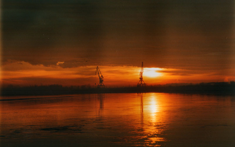 Luka u Šamcu